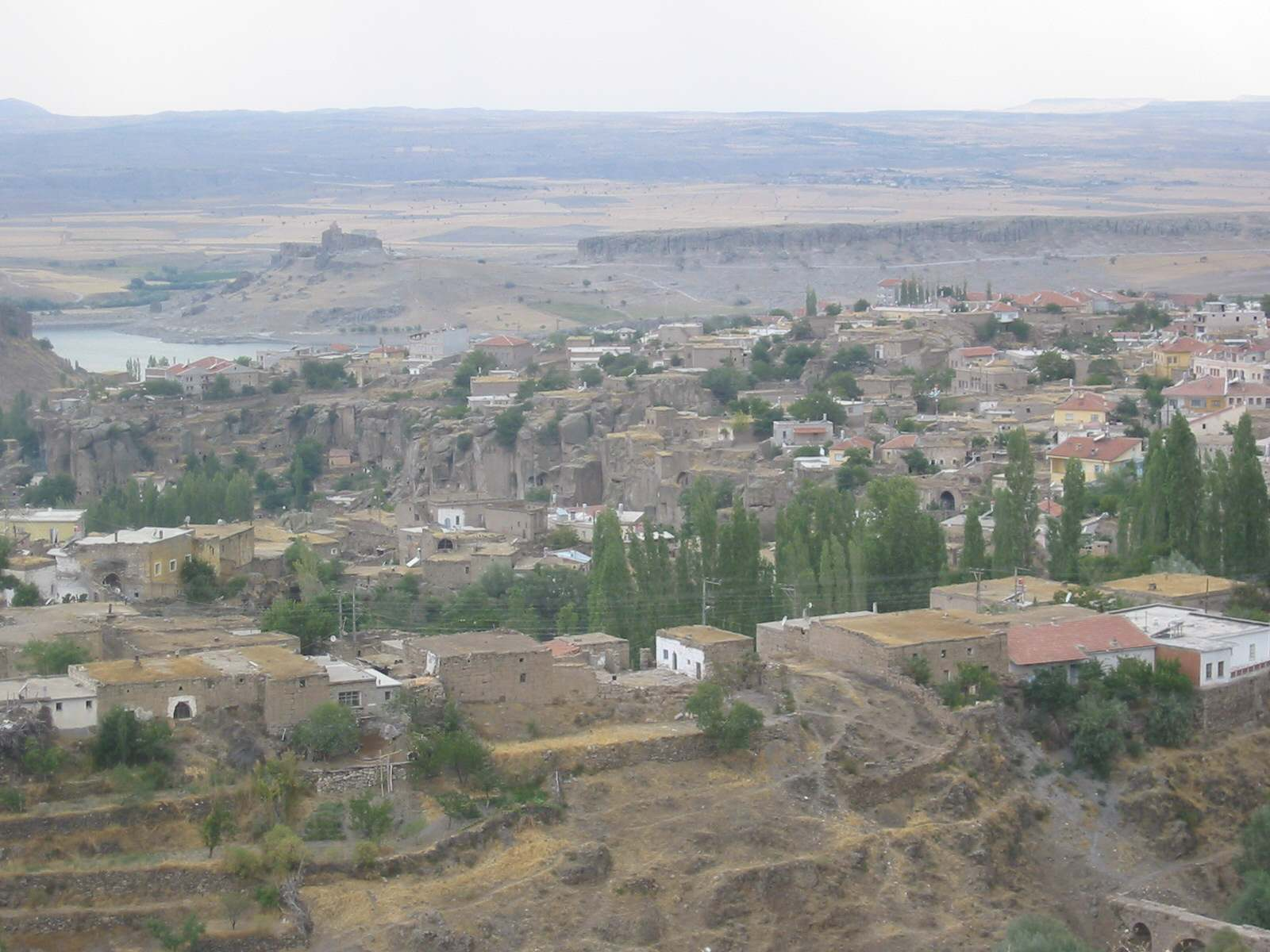 Güzelyurt, Aksaray